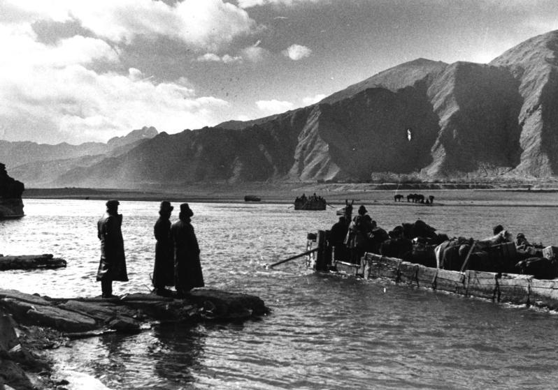 Tschagsam, Übersetzen über den Brahmaputra